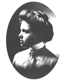 Irma Levasseur, première femme médecin canadienne-française.